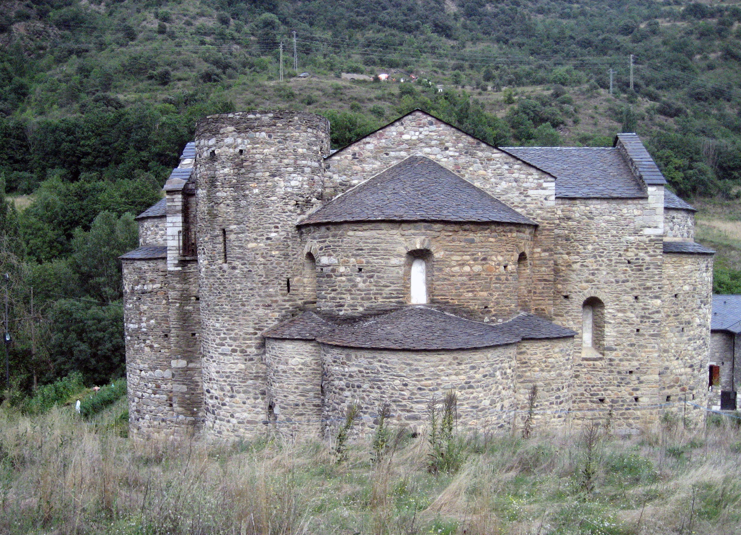 Monasterio de Sant Sadurní de Tavèrnoles en Anserall de la comarca del Alto Urgel Cataluña (España)